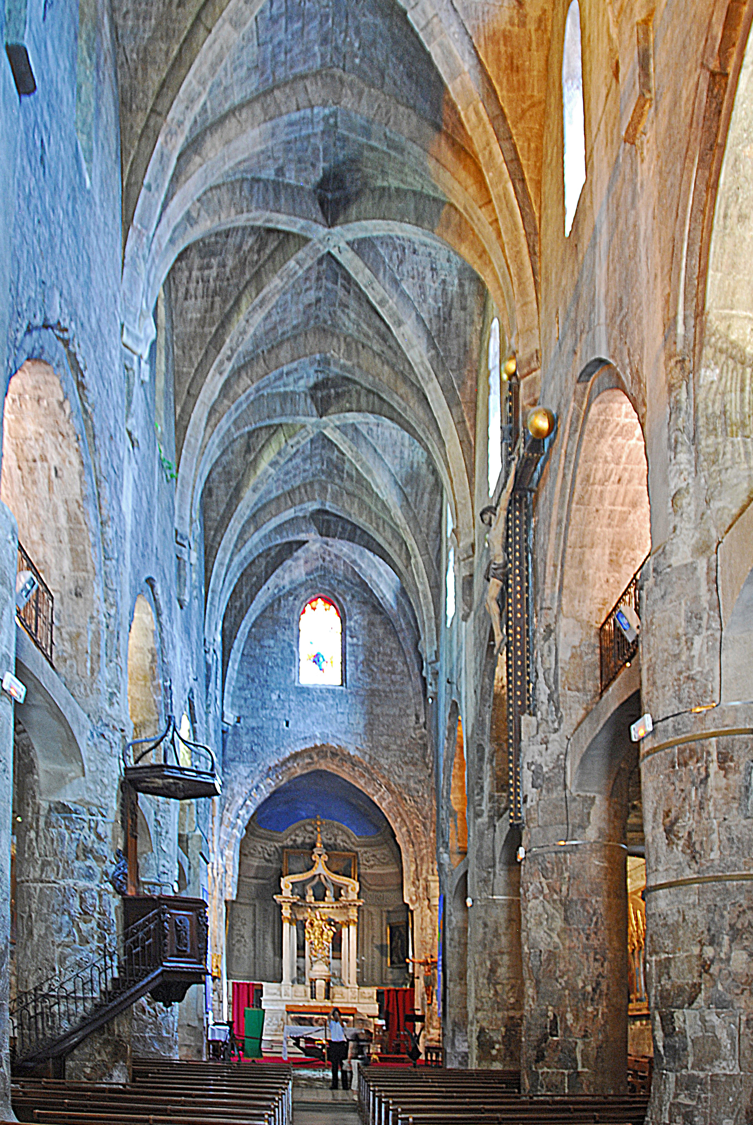 Kathédrale Notre-Dame-du-Puy von Grasse, Mittelschiff zum Chor